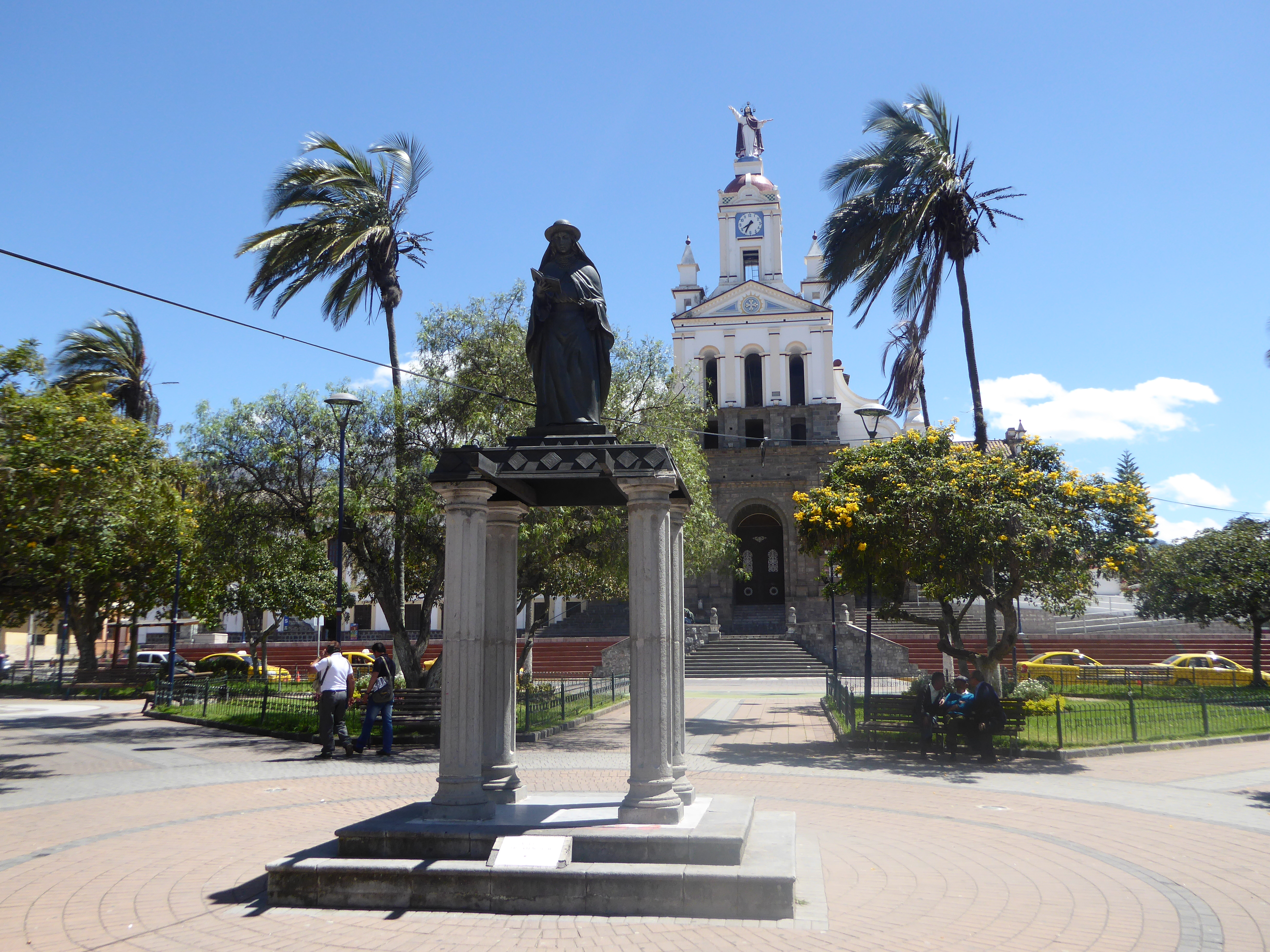 Heiligenstatue vor der Kathedrale von Cotacachi